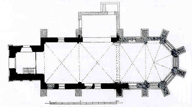 Ev. Kirche St. Lucia in Duisburg-Baerl